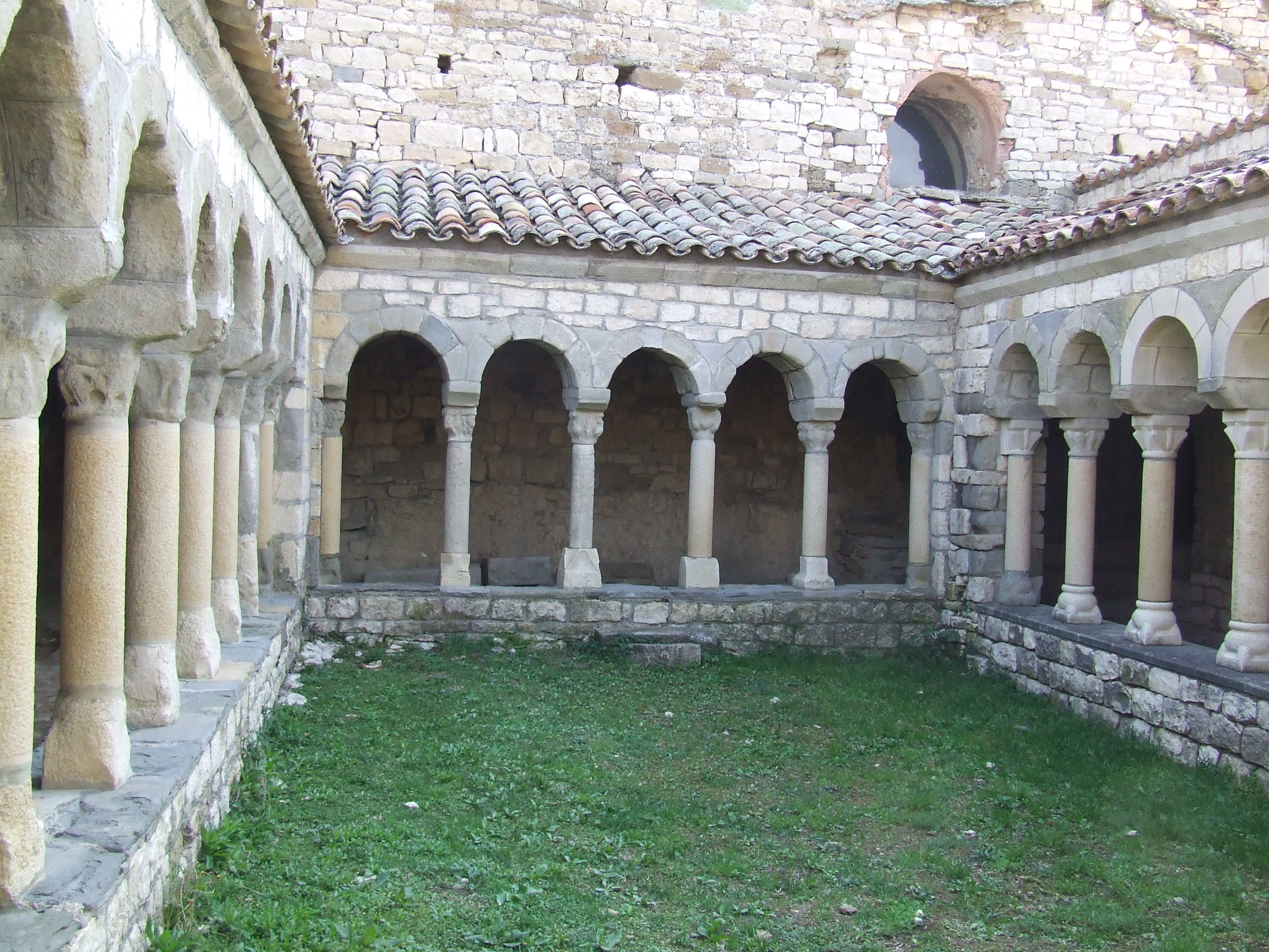 Claustre de Santa Maria de Mur (Mur, Castell de Mur, Pallars Jussà)